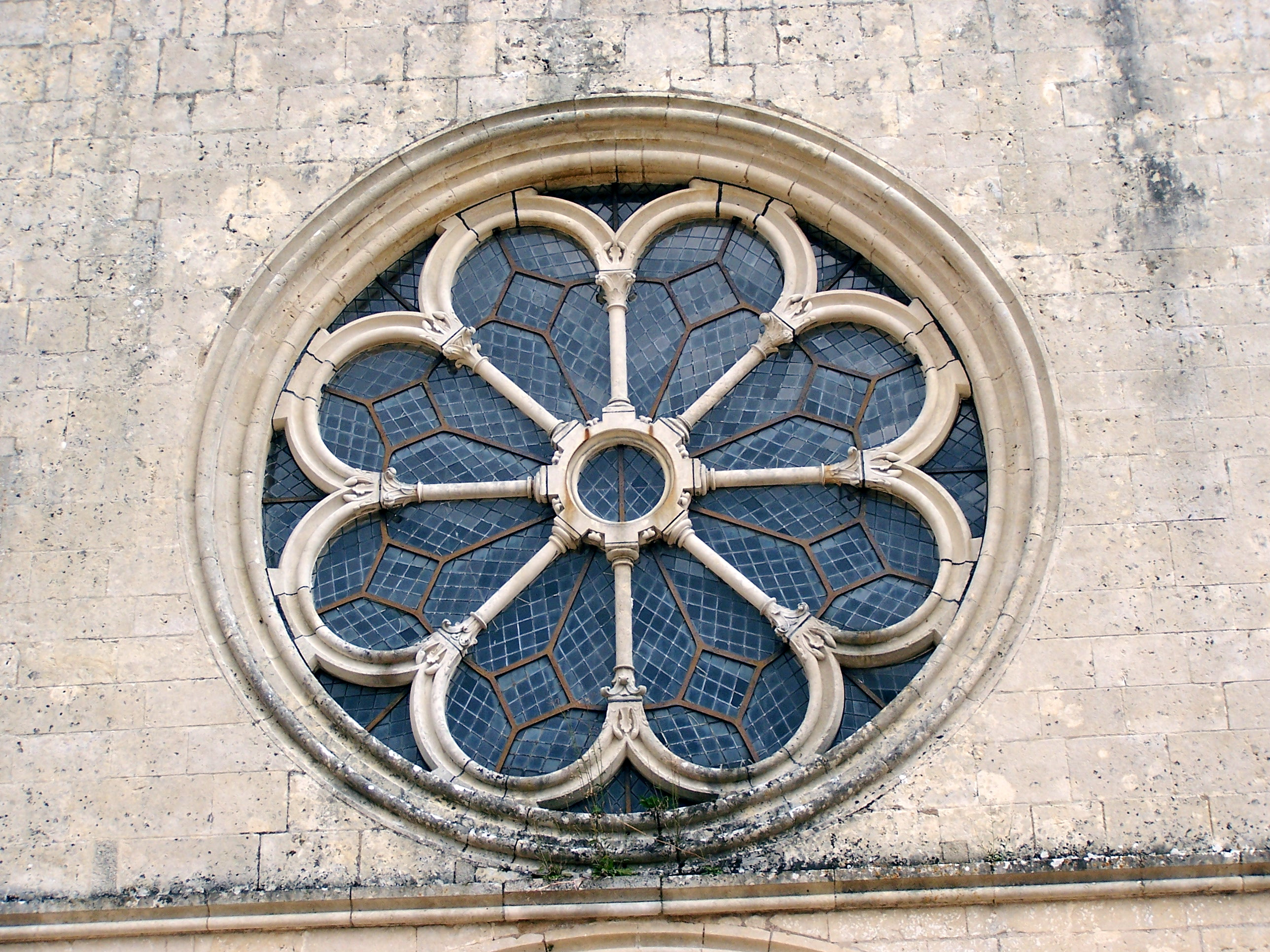 Montréal dans l'Yonne Août 2006